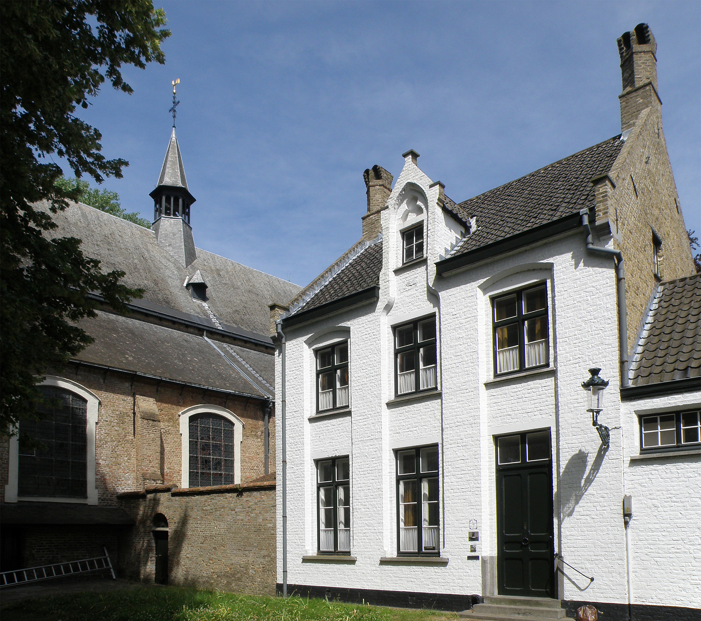 brugge